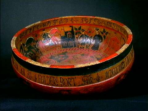 Ølbolle fra Bygland i Setesdal, Aust-Agder,malt av Eidsvollsmannen Even Thorkildsen Lande. Diam. 56.cm. Nå på Norsk Folkemuseum i Oslo. NF.1897-0044.